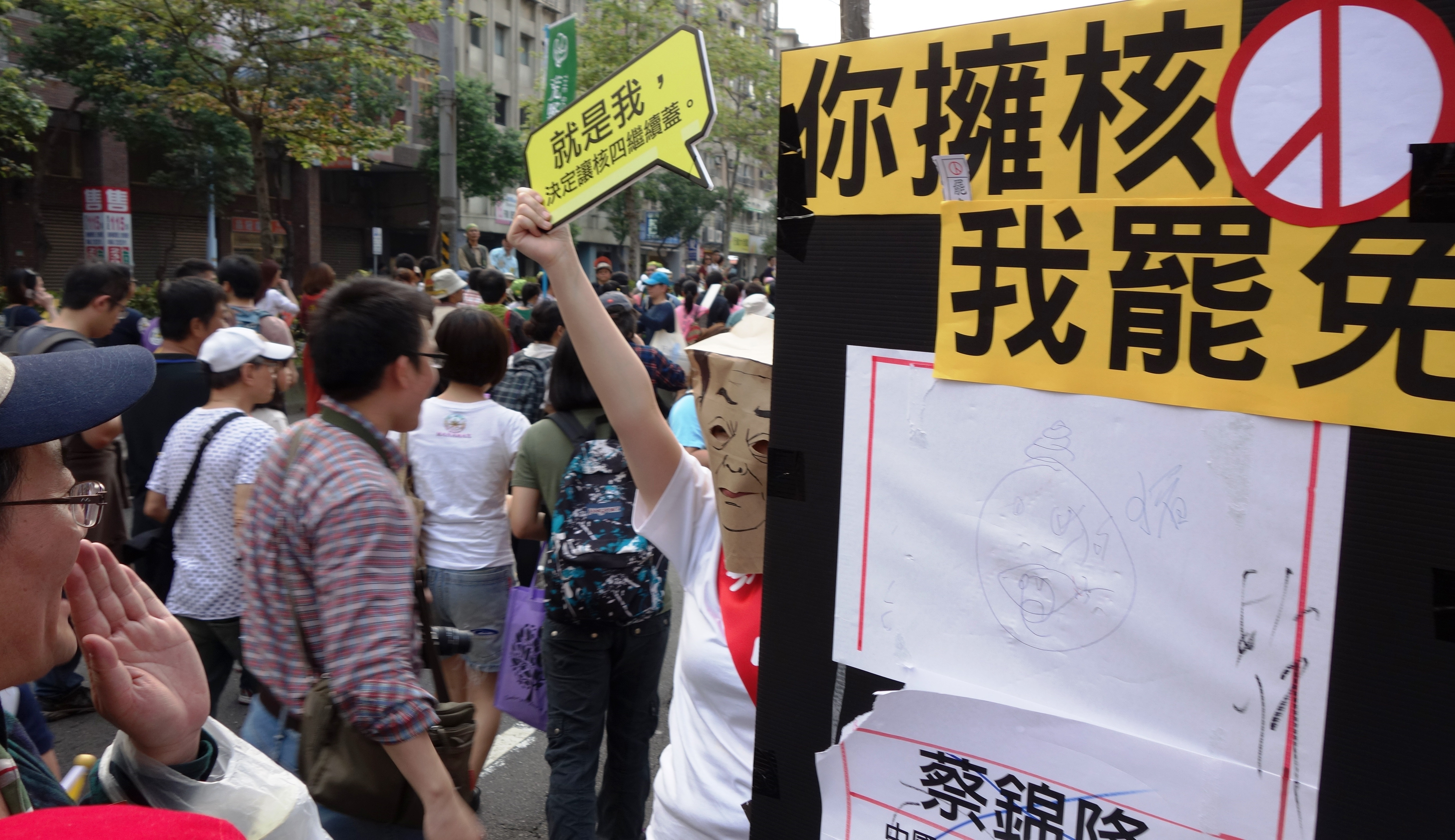 2013.3.9反核行動劇諷刺抨擊臺中市中國國民黨立委蔡錦隆